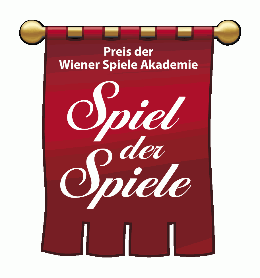 Logo zum Spielepreis Spiel der Spiele